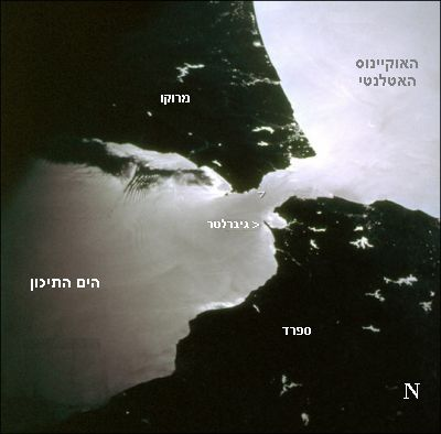 מיצר גיברלטר, כפי שצולם ע"י צוות מעבורת אטלנטיס